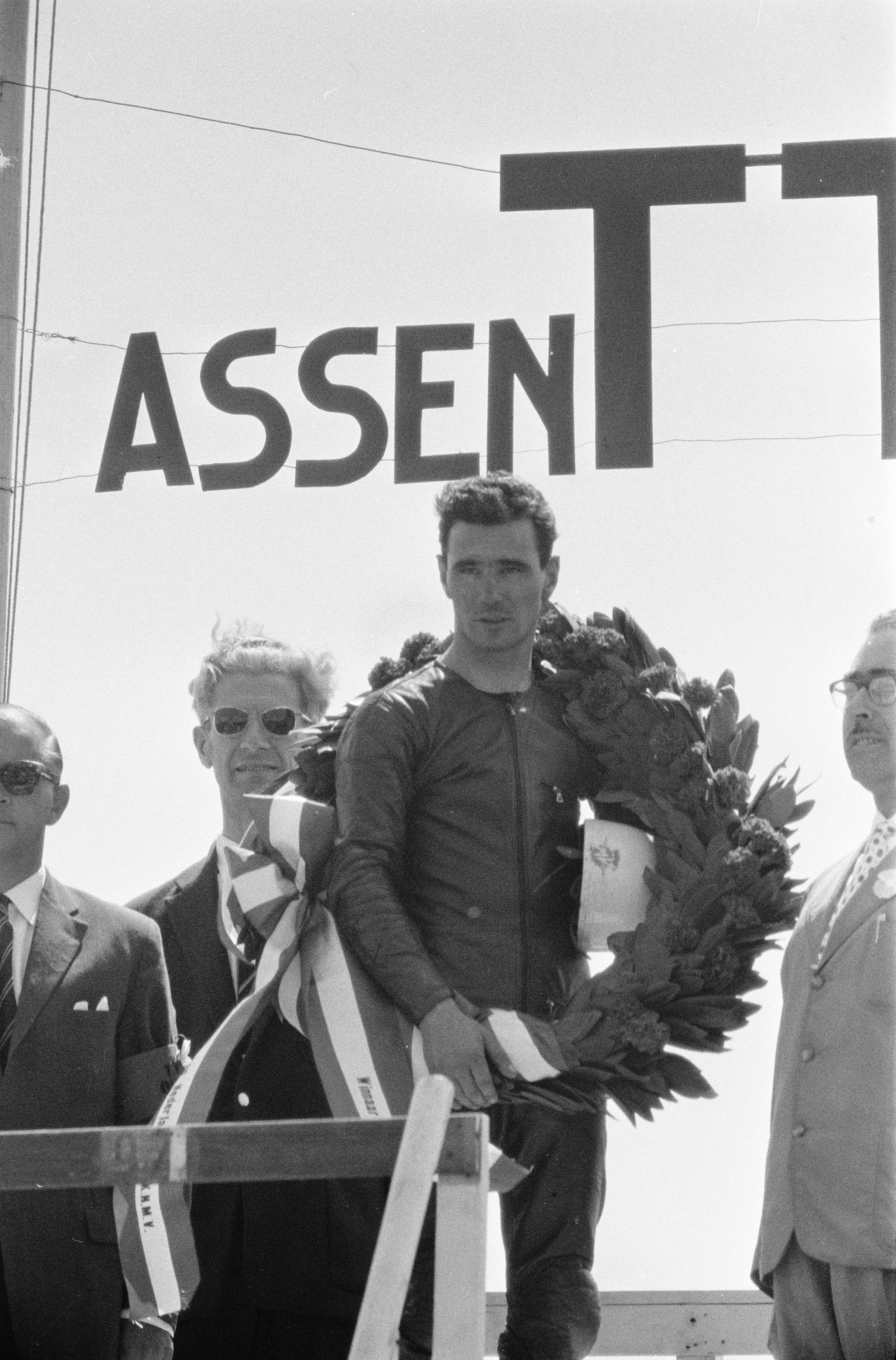 Collectie / Archief : Fotocollectie Anefo Reportage / Serie : TT Assen 1960 Beschrijving : Huldiging Carlo Ubbiali (winnaar 125cc en 250cc) Datum : 26 juni 1960 Locatie : Assen Trefwoorden : motorsport Persoonsnaam : Ubbiali, Carlo Instellingsnaam : TT Fotograaf : Bilsen, Joop van / Anefo Auteursrechthebbende : Nationaal Archief Materiaalsoort : Negatief (zwart/wit) Nummer archiefinventaris : bekijk toegang 2.24.01.05 Bestanddeelnummer : 911-3660